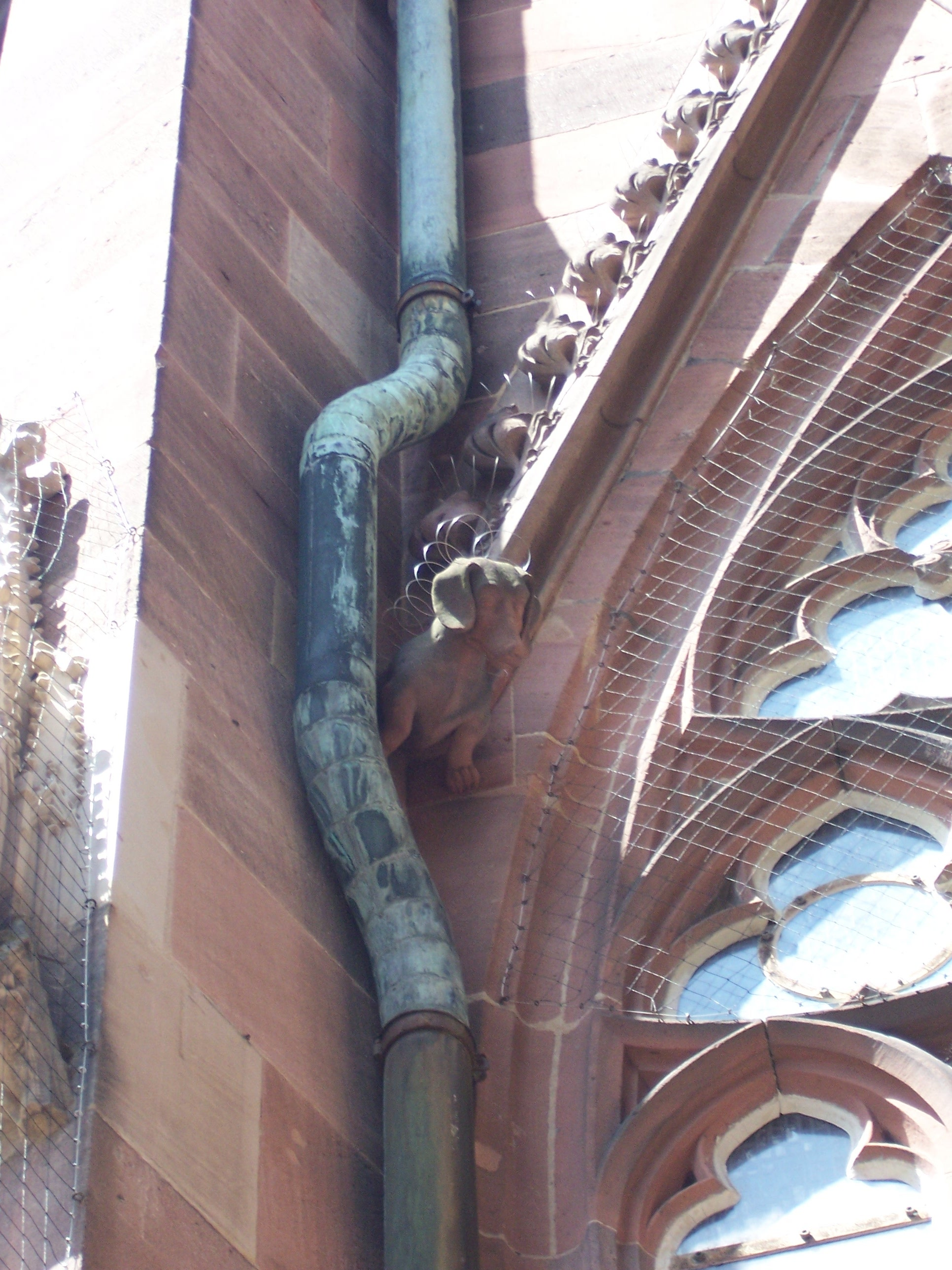 Dackel am Südportal